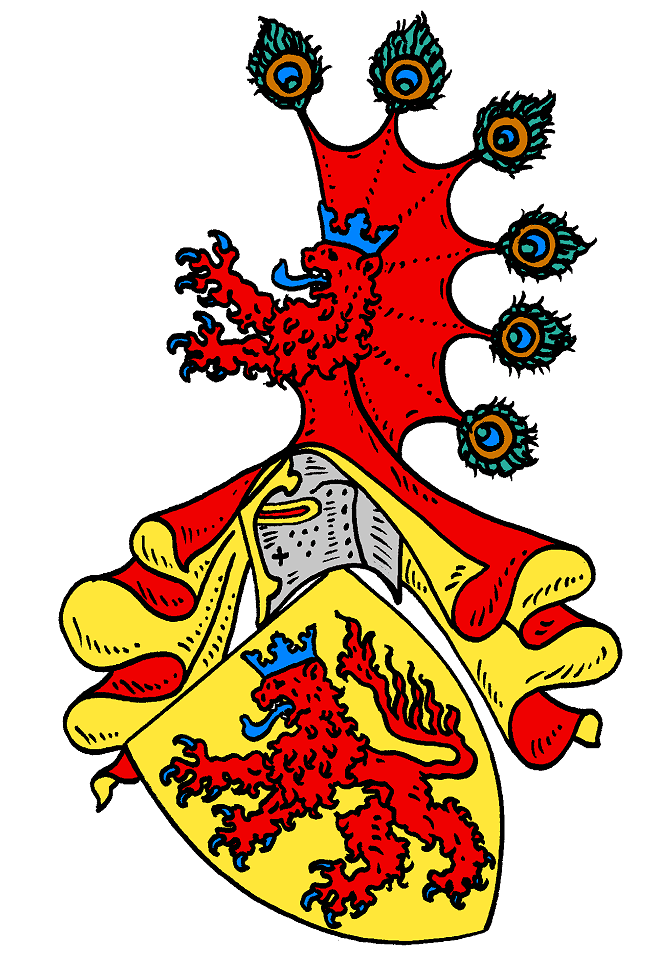 Stammwappen der Habsburg, nach Darstellungen des 16. Jh.